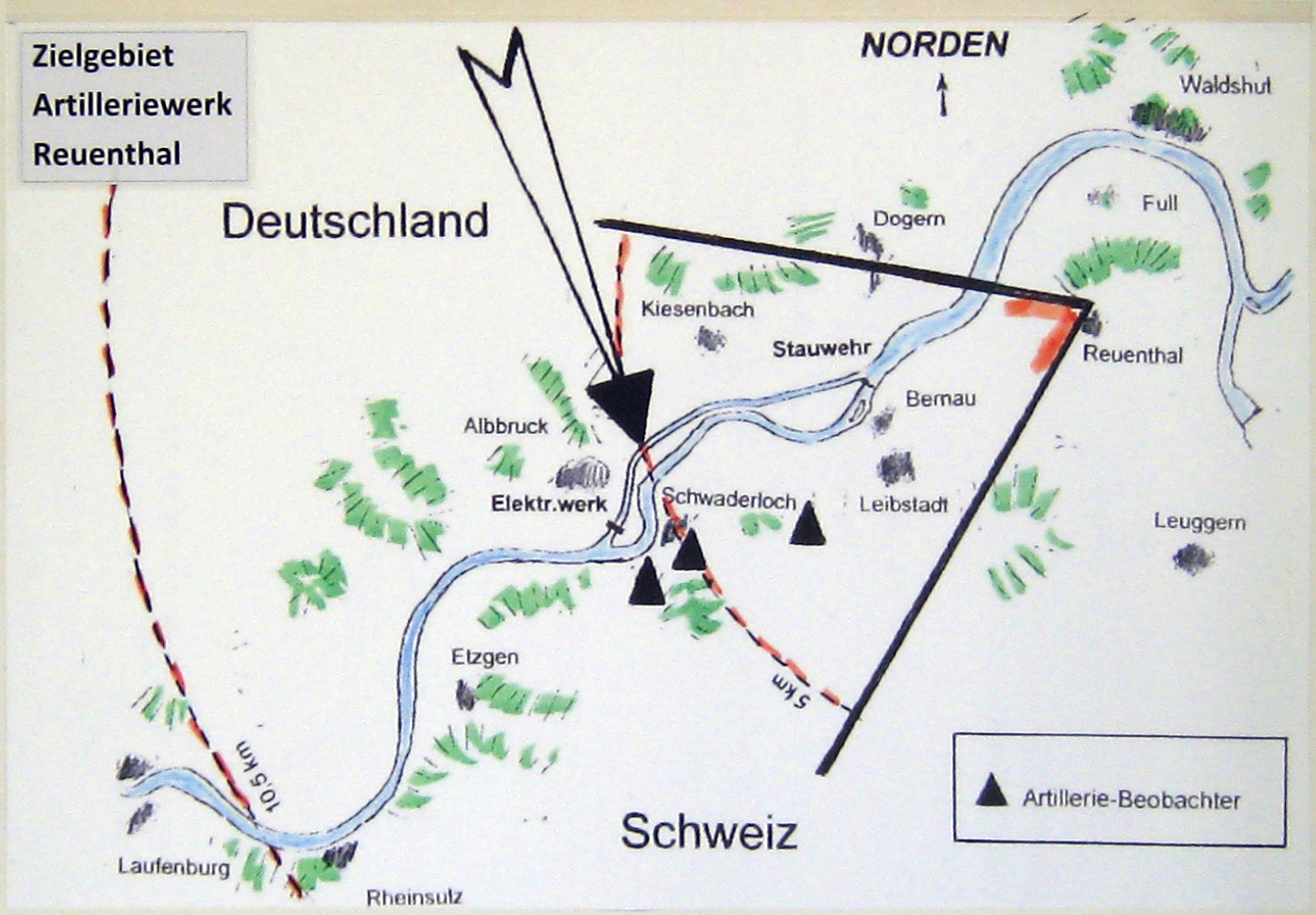 Wirkungsraum Festung Reuenthal